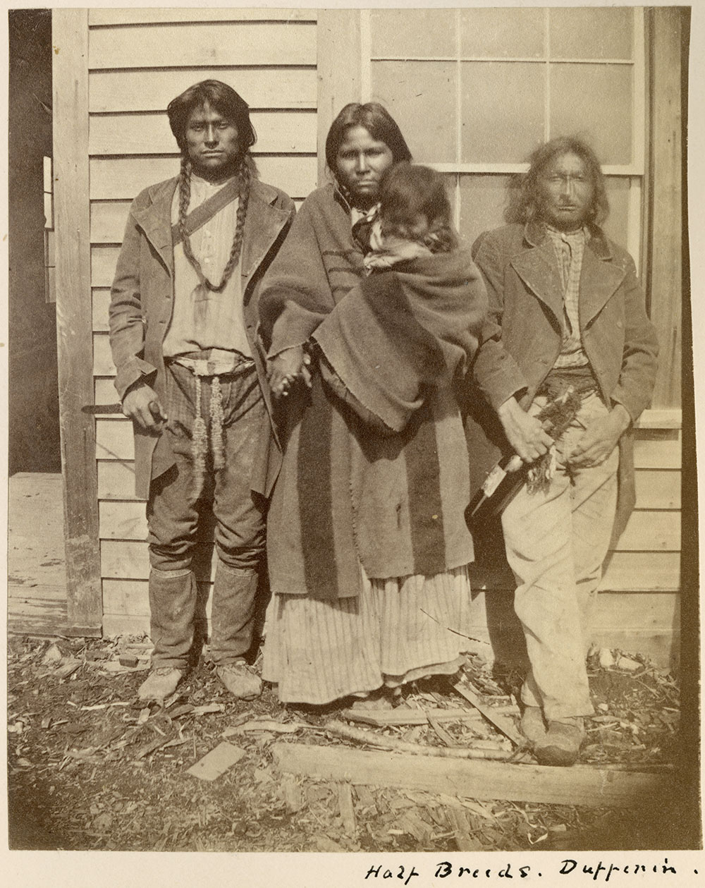 Title / Titre : Unidentified Métis at Fort Dufferin, Manitoba / Métis non identifiés à Fort Dufferin (Manitoba) Description : The formal survey of the border between Canada and the United States began in 1872. Fort Dufferin was constructed on the Red River that year and used as a base for the North American Boundary Commission until 1874. These two men might have been some of the Métis hired as scouts and guides by the Commission. / L’arpentage de la frontière entre le Canada et les États-Unis fut amorcé en 1872. La même année, le fort Dufferin fut construit aux abords de la rivière Rouge; il servit de base à la Commission des frontières de l’Amérique du Nord jusqu’en 1874. Les deux hommes représentés ici étaient probablement des Métis embauchés comme éclaireurs et guides par la Commission. Creator(s) / Créateur(s) : George M. Dawson Date(s) : 1873-1874 Reference No. / Numéro de référence : MIKAN 3248454, 4848112 Location / Lieu : Manitoba, Canada Credit / Mention de source : George M. Dawson. Library and Archives Canada, e011156521 / George M. Dawson. Bibliothèque et Archives Canada, e011156521